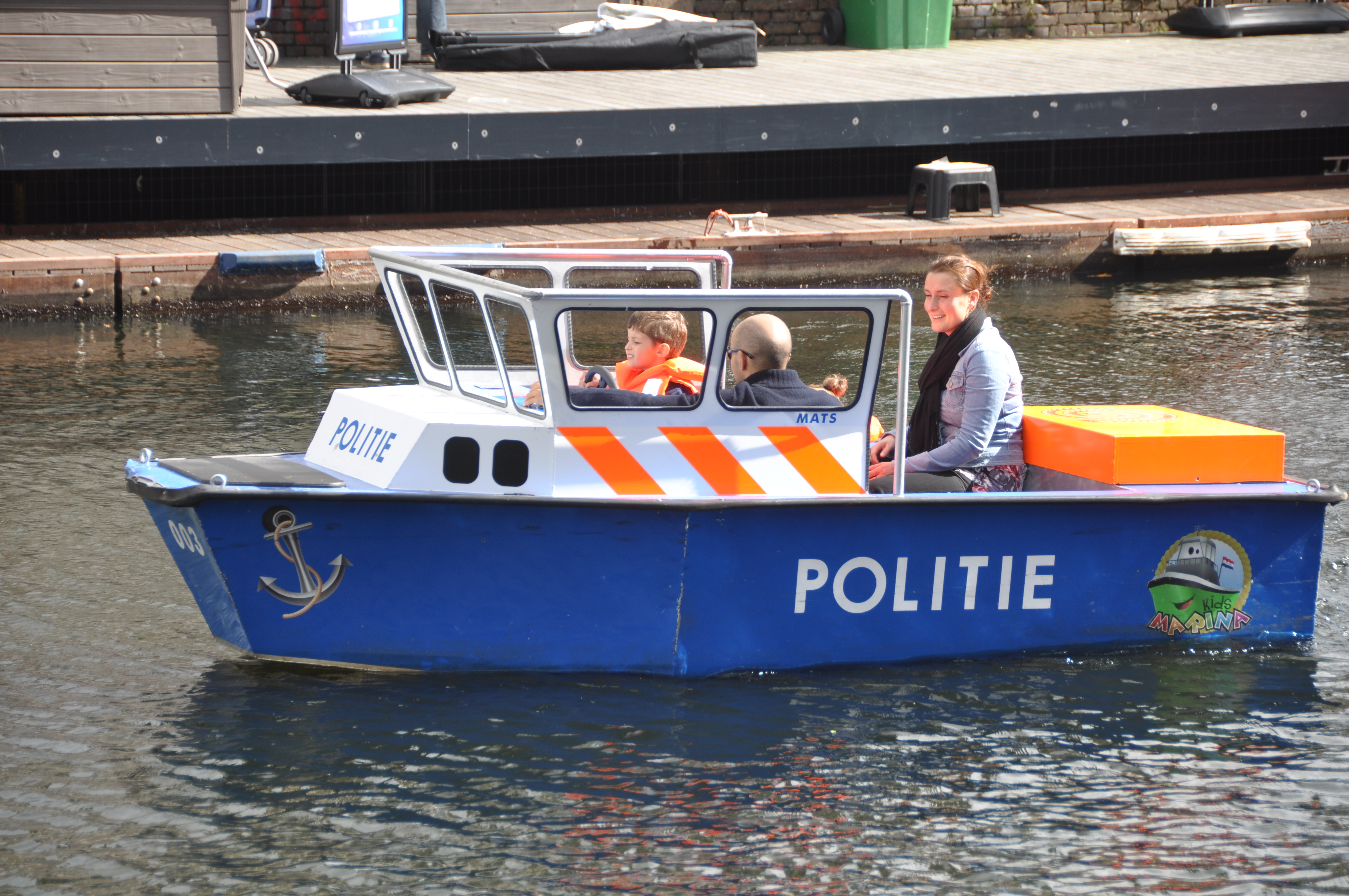 Een elektrisch bootje van de Kids Marina in Rotterdam.